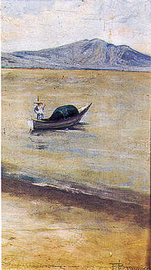 Obra "Chapala", de Félix Bernardelli